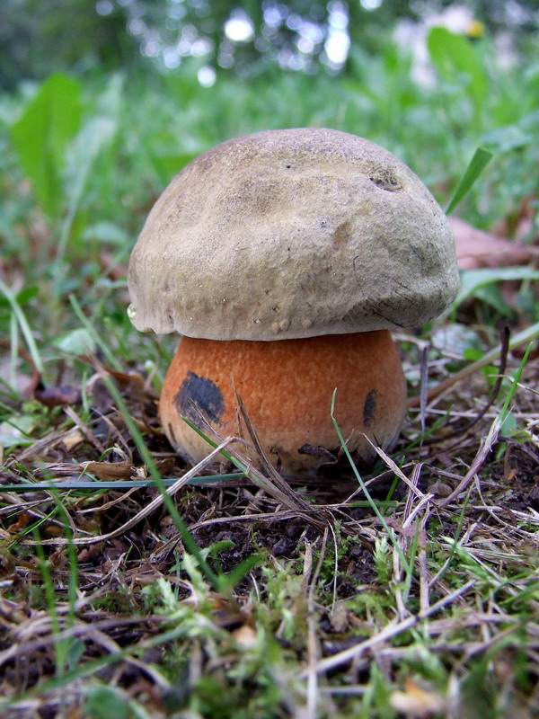 Boletus luridus. Dasiūnai, Kaunas district, Lithuania.